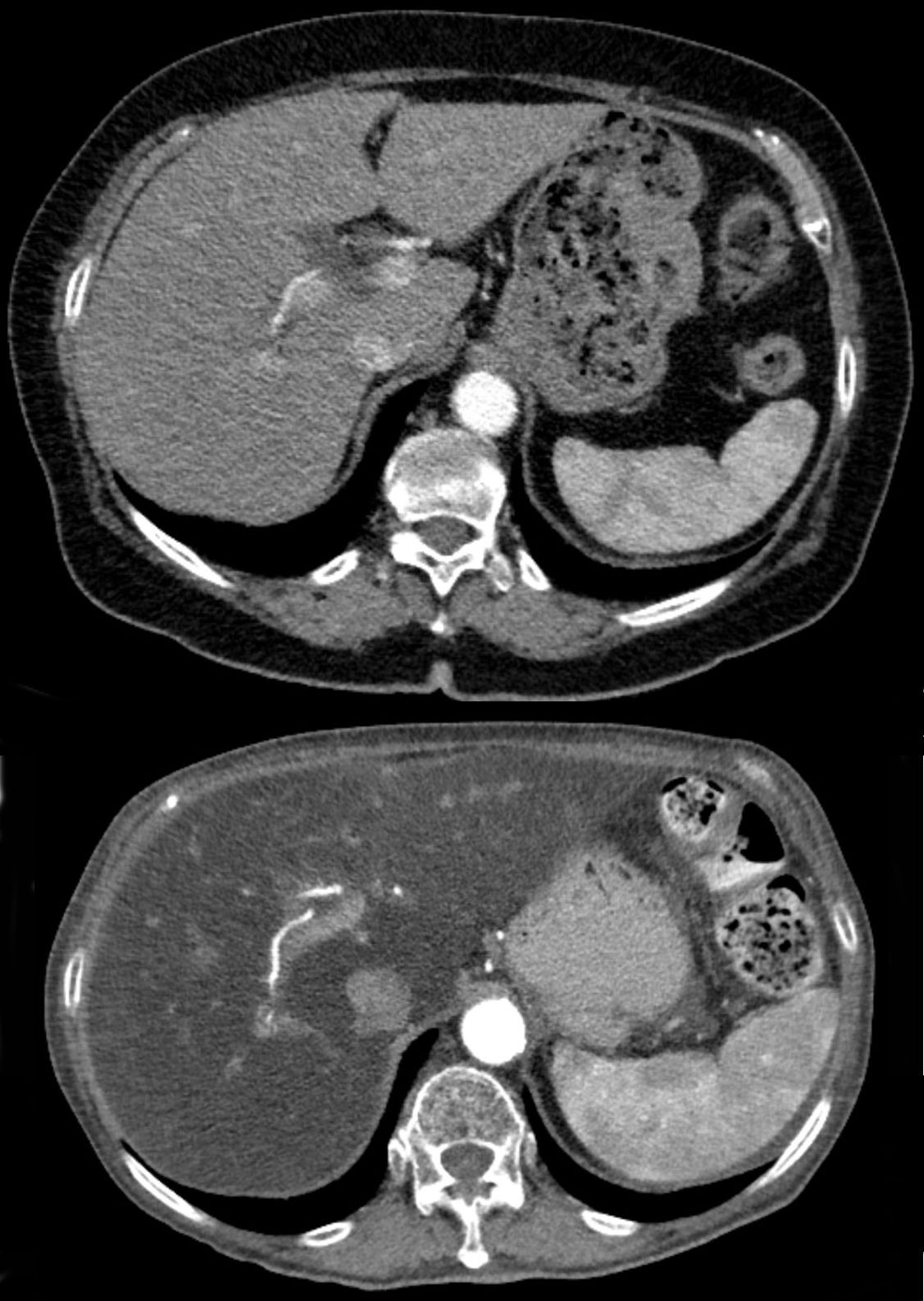 Oben normale Leber in der Computertomographie, unten selber Patient mit Ausbildung einer ausgeprägten Steatosis hepatis im Rahmen einer durchgeführten Chemotherapie. Die Leber wird durch die zunehmende Einlagerung von wenig röntgendichtem Fett dunkler. Deutlich sieht man auch den gleichzeitigen Verlust von Fettgewebe subkutan und mesenterial bei fortschreitendem Tumorleiden.